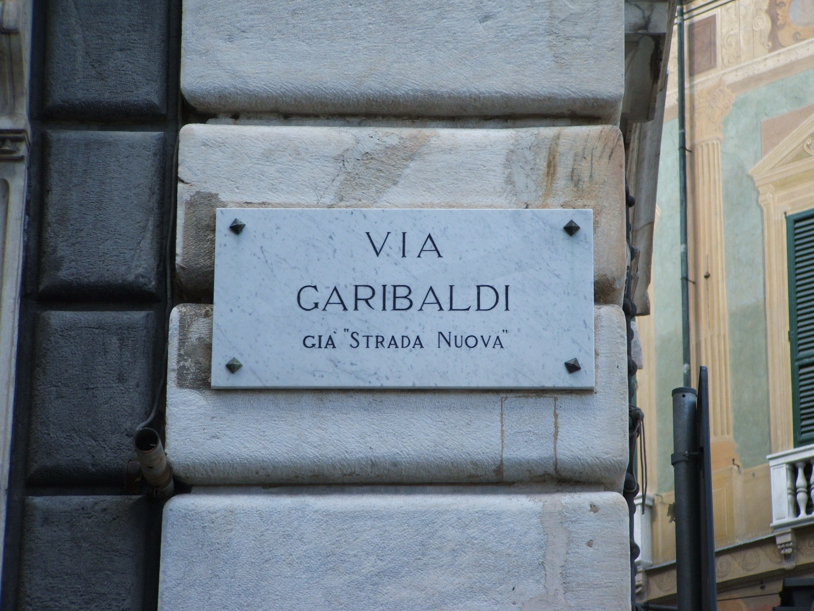 Genova, Via Garibaldi Insegna stradale di via Garibaldi